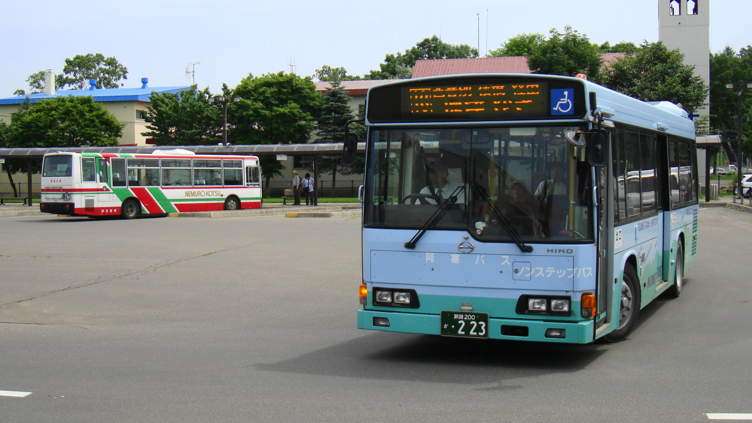 中標津バスターミナルに集まる標津線代替バス